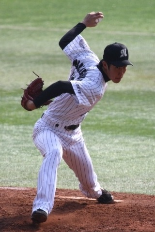 日本プロ野球 千葉ロッテマリーンズ 中後悠平 投手 背番号16